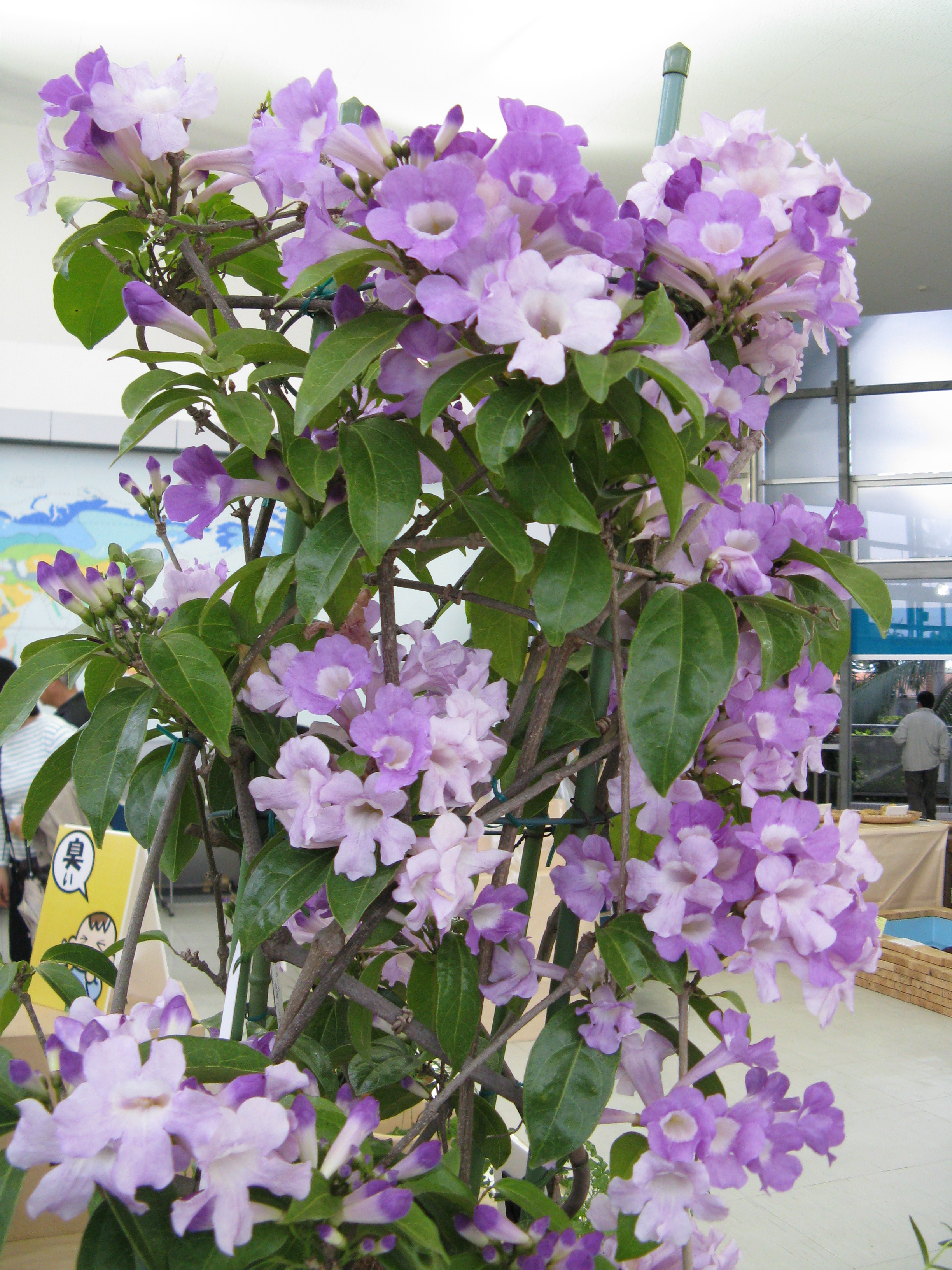 Scientific name Mansoa alliacea Place:Sakuya Konohana Kan,Osaka,Japan